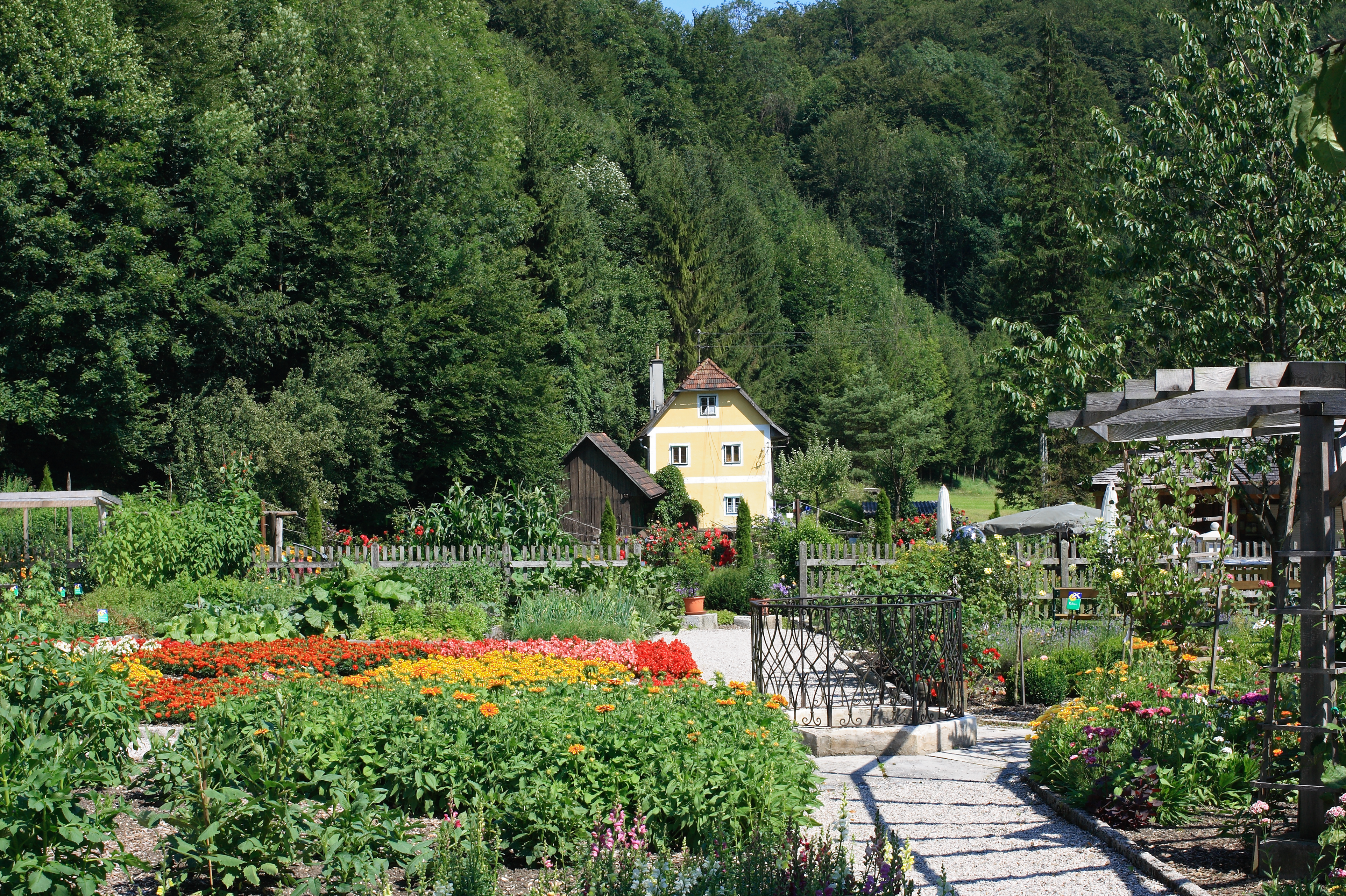 Der Herrschaftsgarten des Neuen Herrenhauses im Ensemble Schmiedleithen. Das Gebäude dahinter ist der ehemalige Wohnort des Gärtners (Gärtnerhäusl)